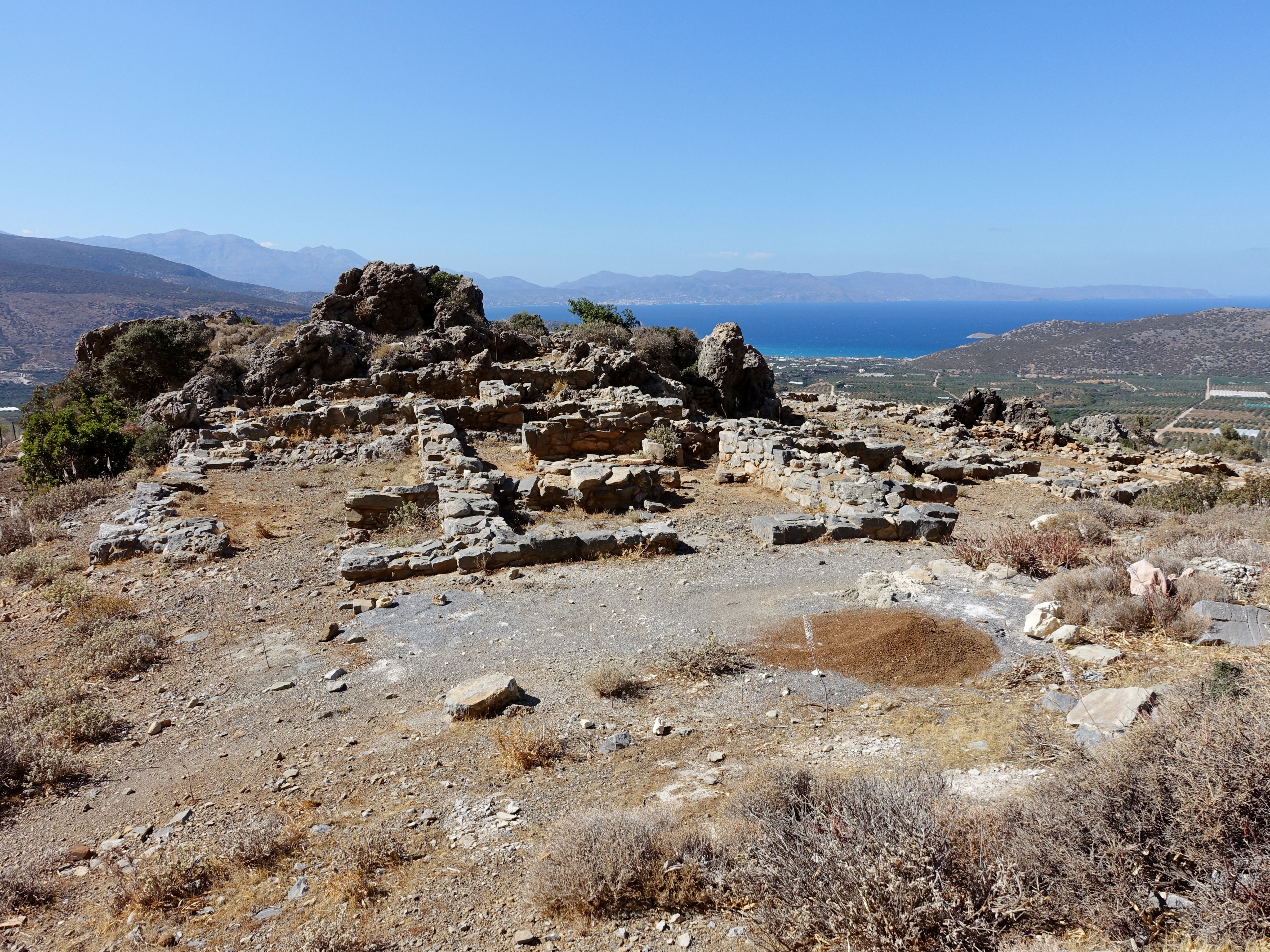 Ausgrabungsstätte von Chalasmenos (Χαλασμένος) bei Monastiraki, Kreta, Griechenland